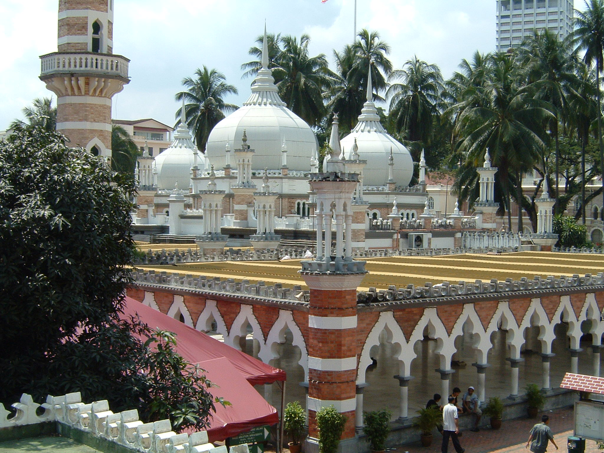 Mosque Jamek, Kuala Lumpur